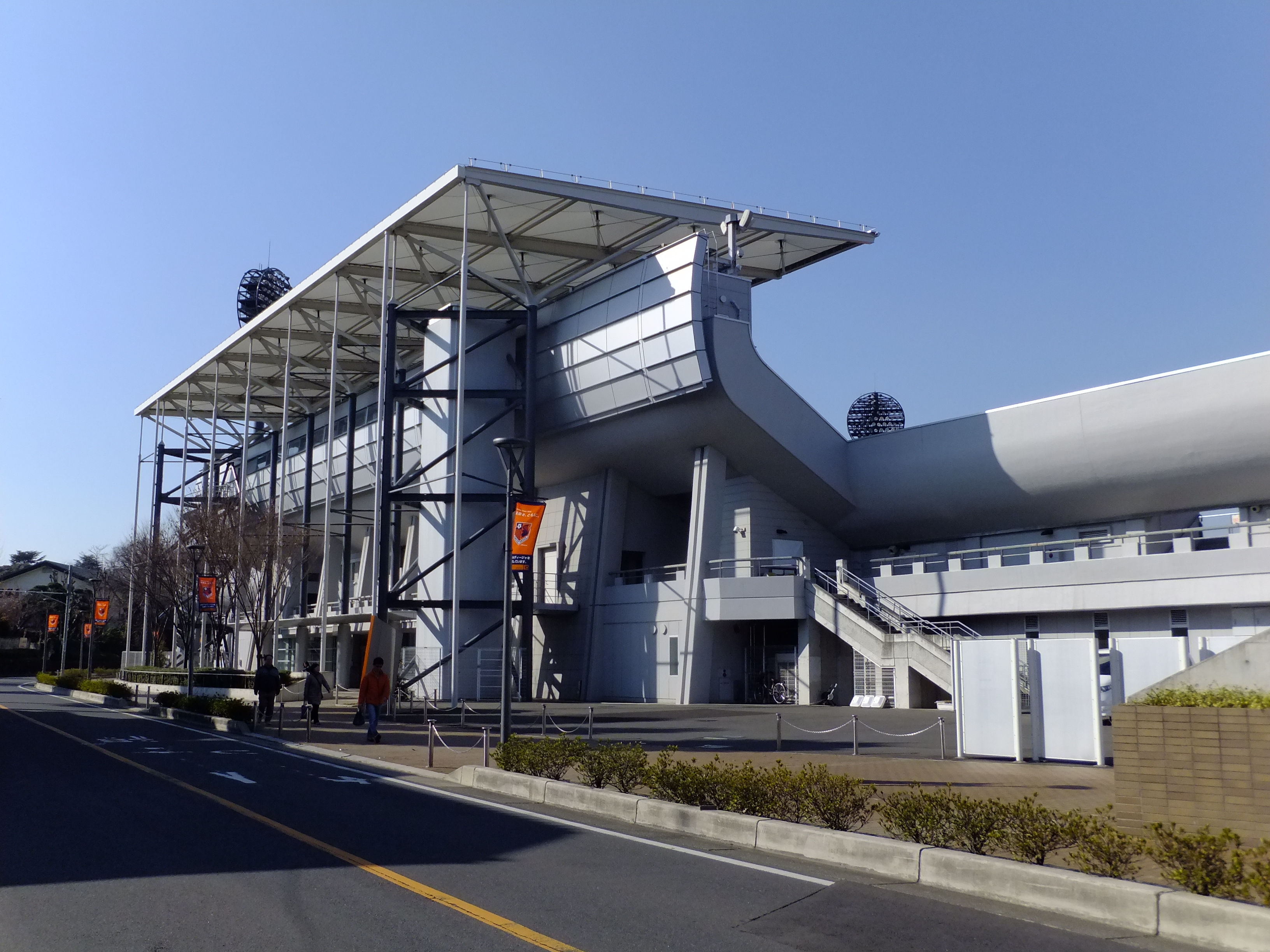 大宮アルディージャの本拠地スタジアム、Nack5スタジアム（大宮公園サッカー場、さいたま市大宮区）